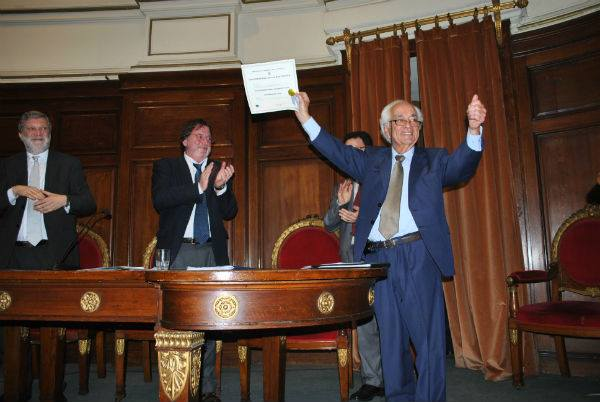 El Ing. Jorge Brovetto recibe su doctorado honoris causa en el Paraninfo de la Universidad de la República.